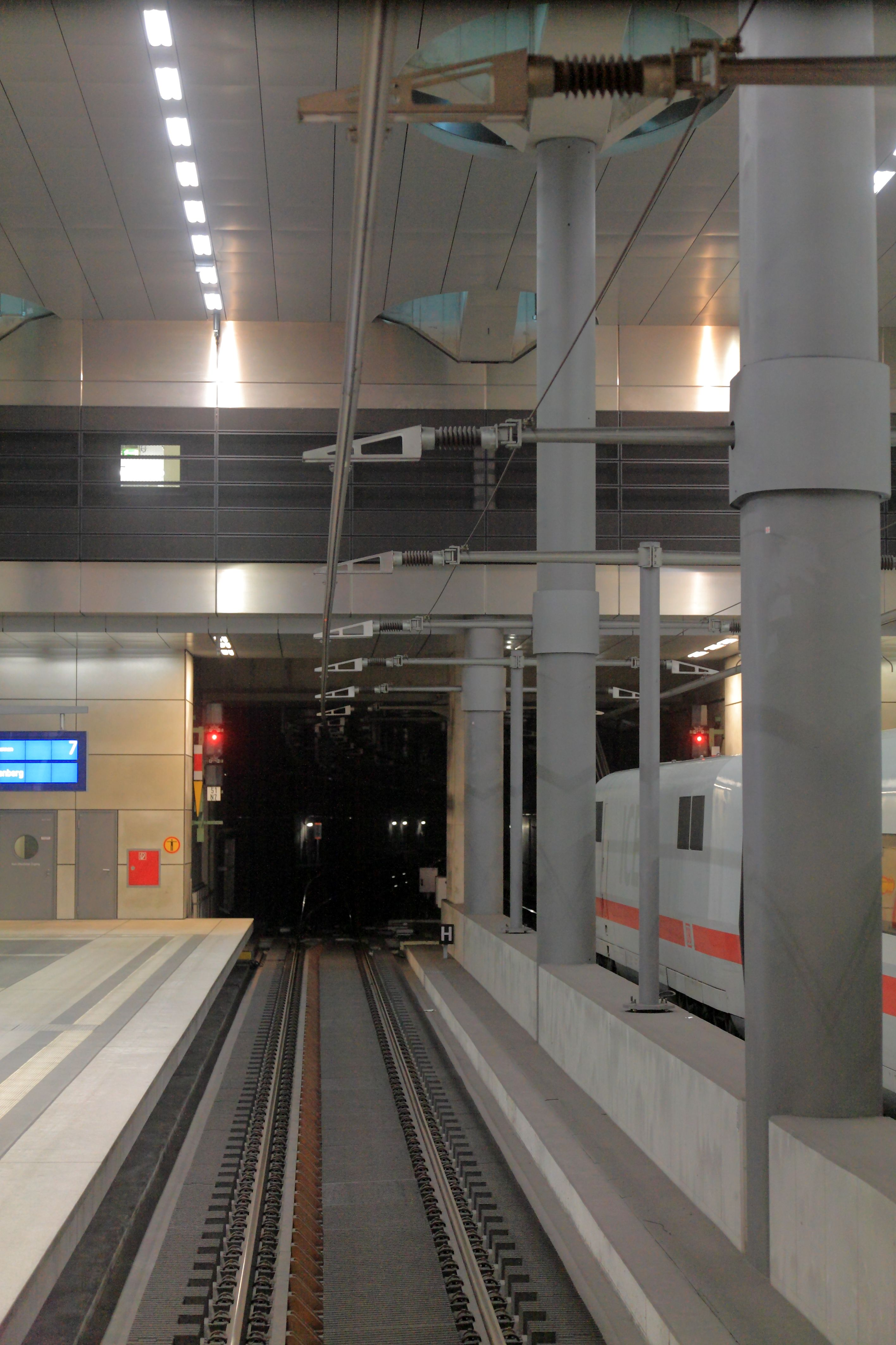 Gleis 7, das Ausfahrsignal steht ohne Schachbretttafel links vom Gleis. Verwechslungsgefahr besteht allerdings nicht.